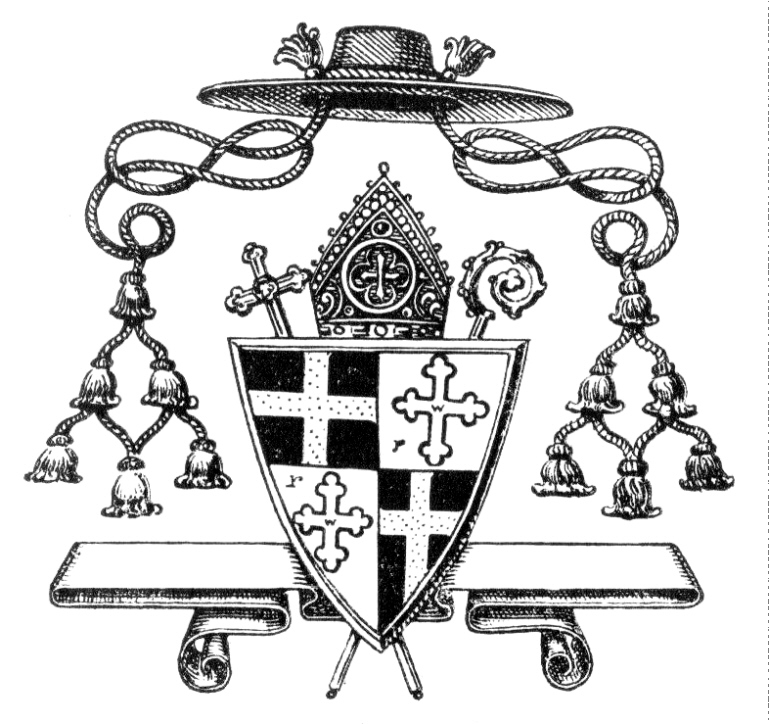 Wappen des Rottenburger Bischofs Karl Joseph von Hefele